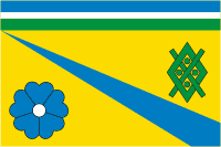 Флаг Первосинюхинского сельского поселения, Краснодарский край, Россия.